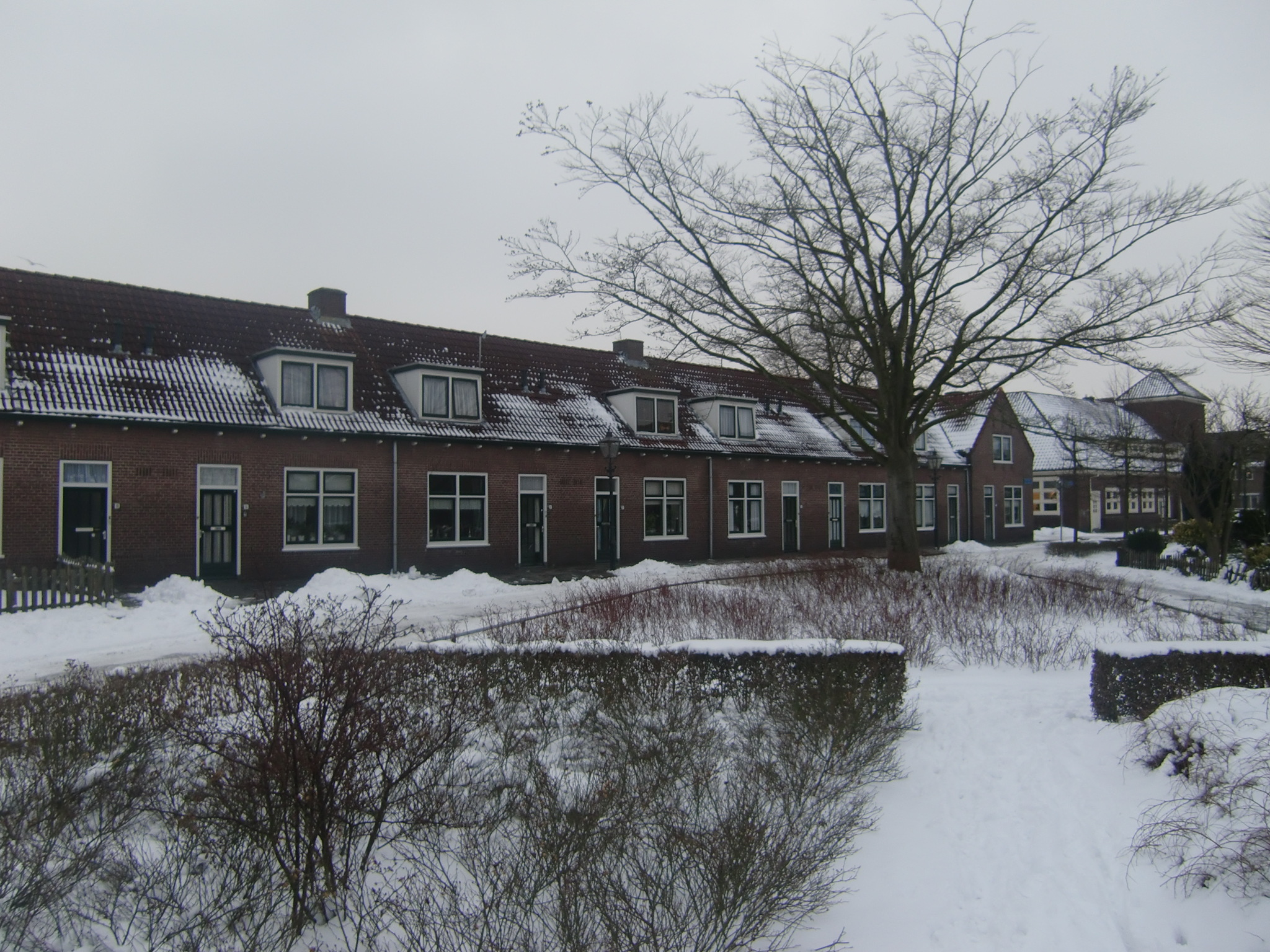 Huizenblok Beter Wonen (10 stuks). Rijksmonumentnummer 499109